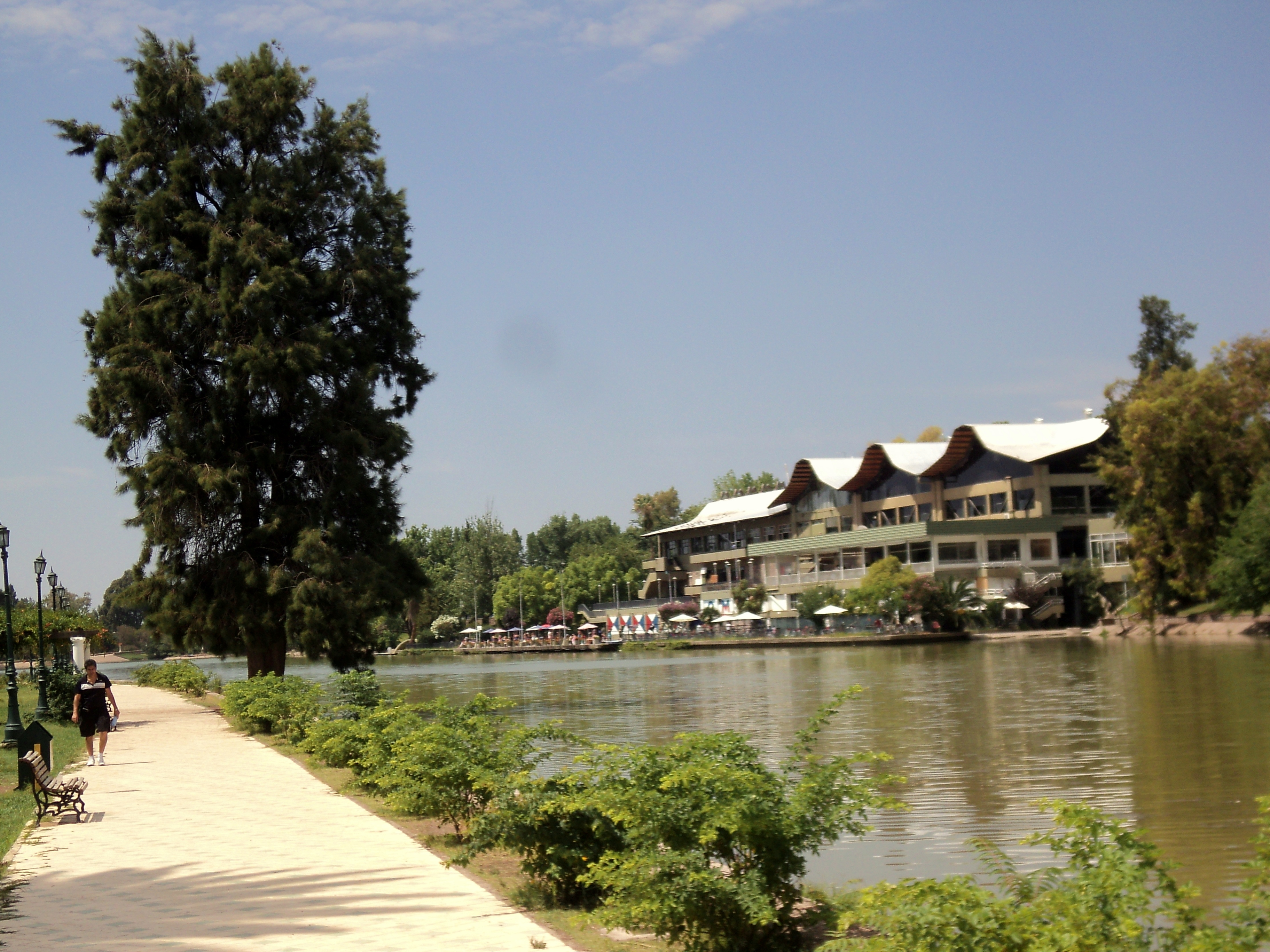 club regatas sobre el lago